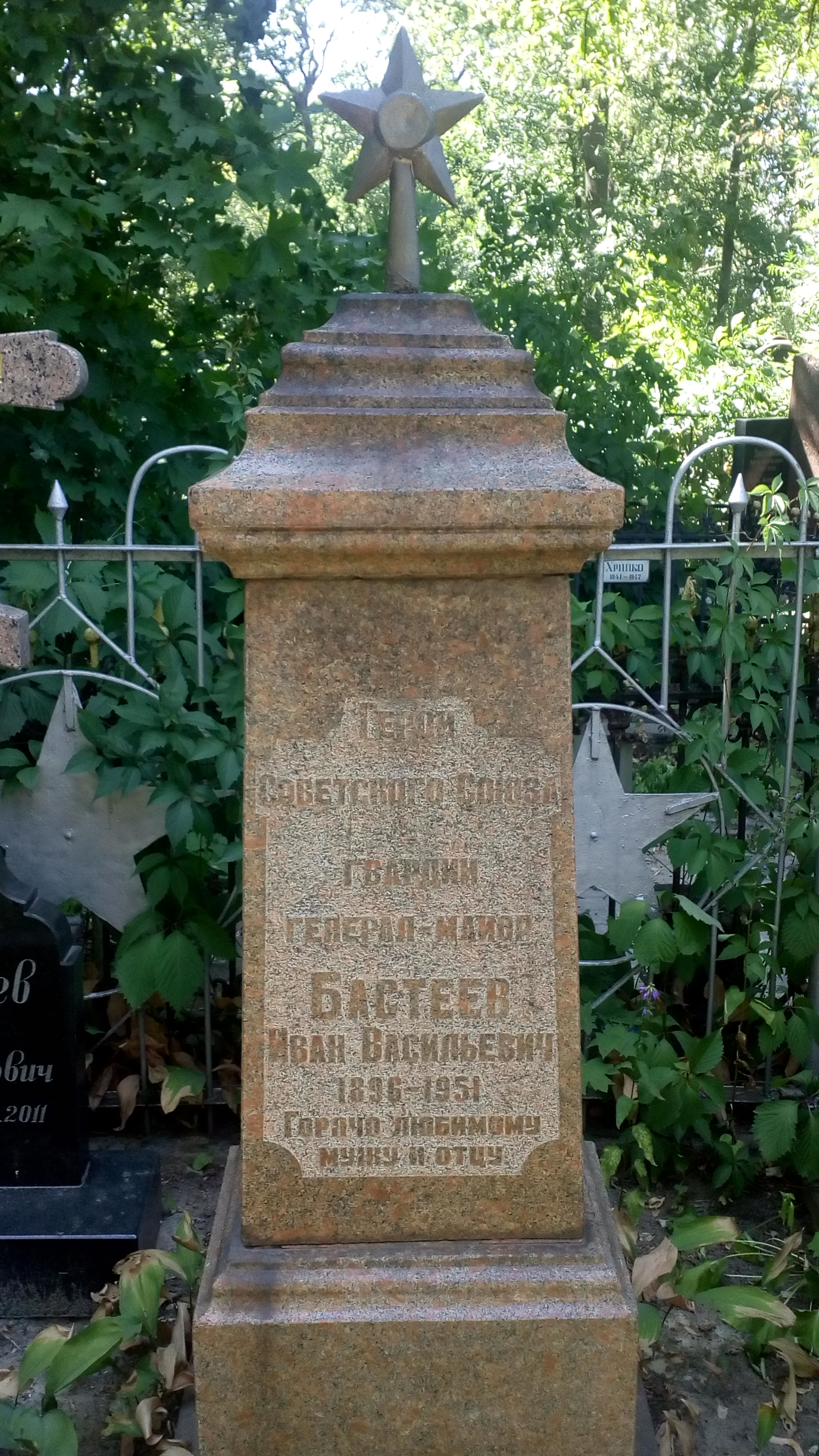 Могила Бастєєва І. В., генерал-майора, Героя Радянського Союзу, Харків, вул. Пушкінська, 102, 2-е міське кладовище